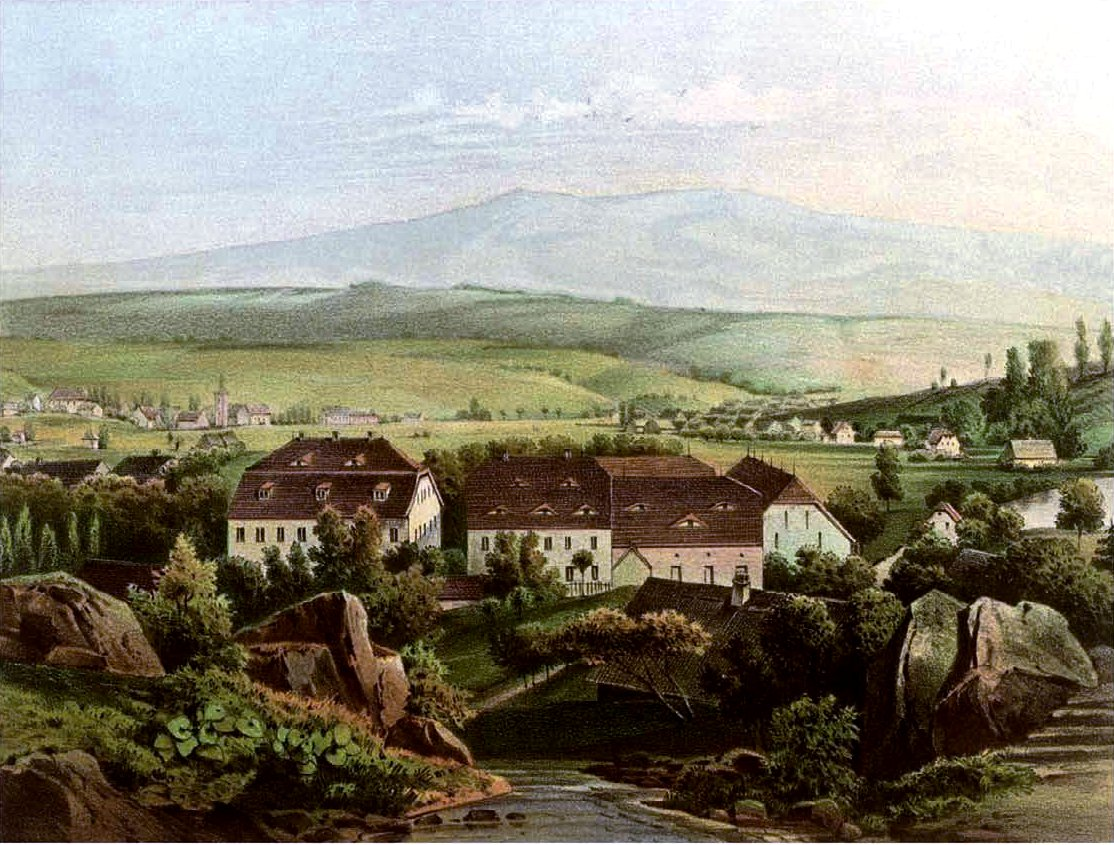 Schloss Holzkirch, Kreis Lauban, Provinz Schlesien, Lithografie aus dem 19. Jahrhundert